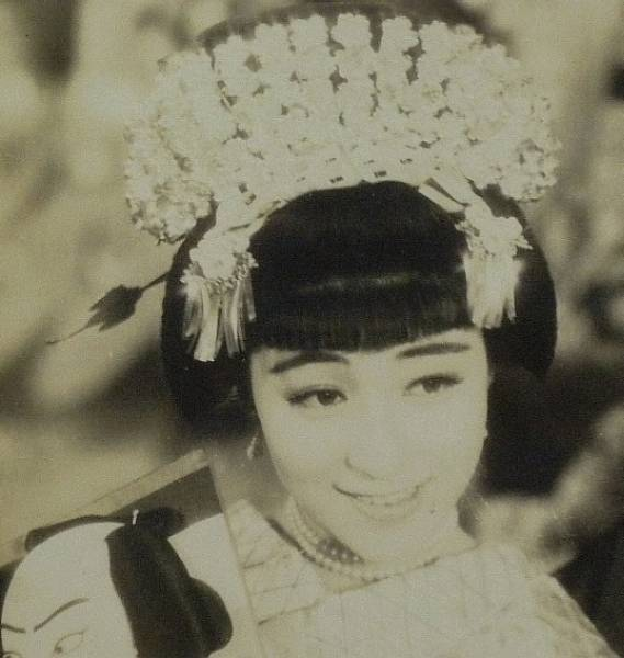 『歌ふ狸御殿』、1942年